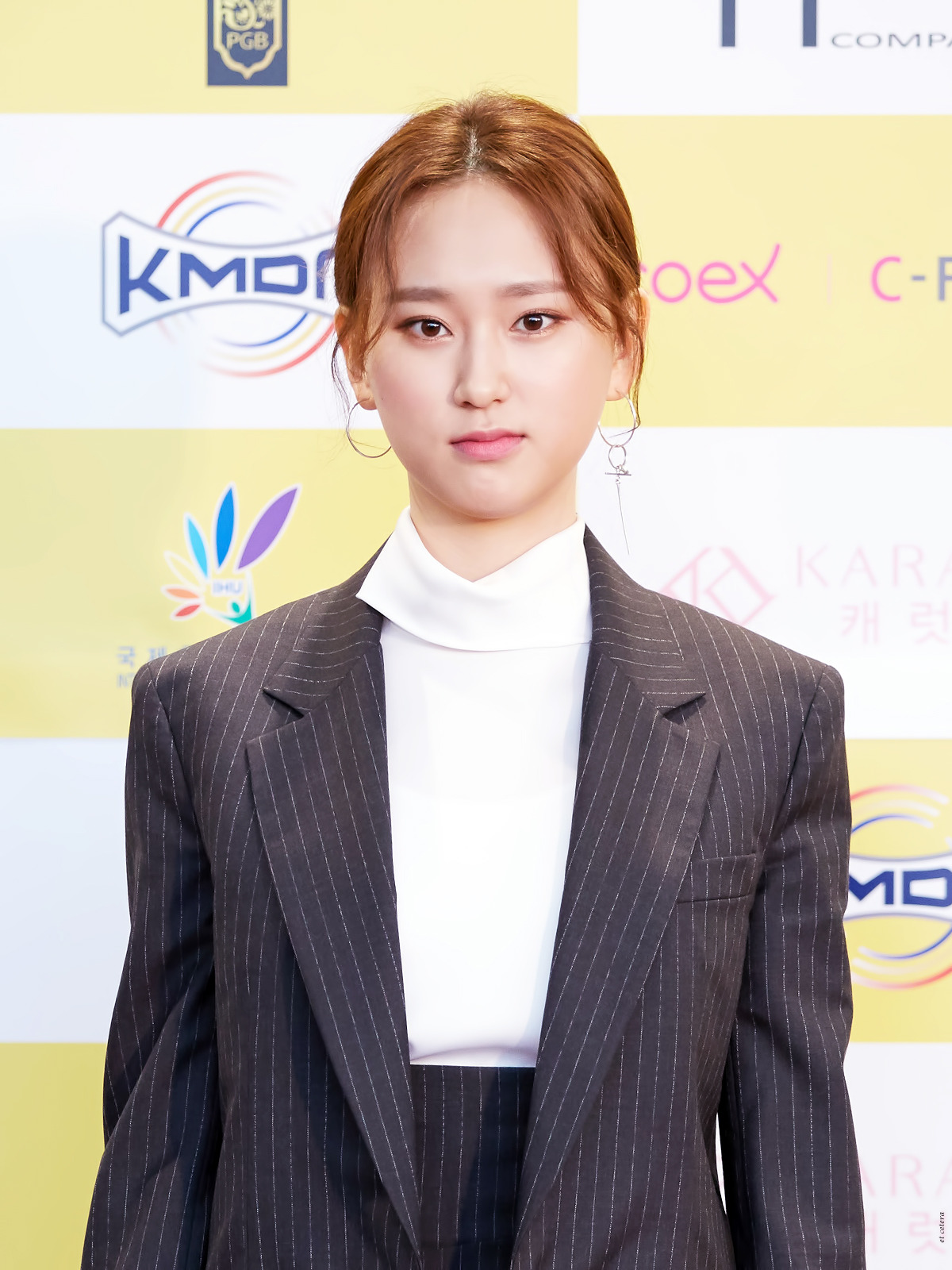 Ryu Hye-young auf den Chunsa Film Awards 2016.